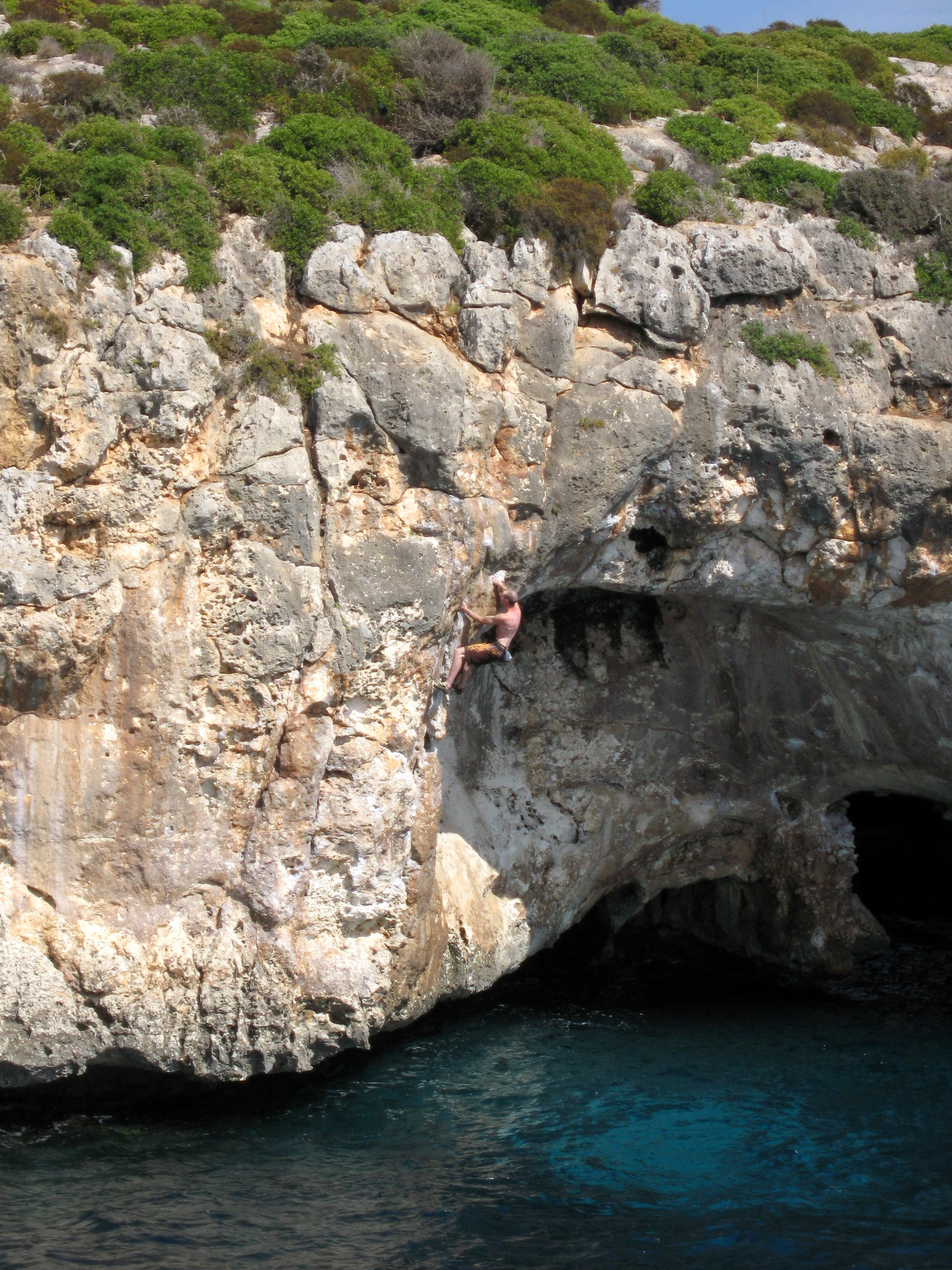 Freiklettern (Psicobloc / Deep Water Soloing) an der Steilküste der Caló Blanc, Nebenbucht der Cala Varques, Gemeinde Manacor, Mallorca, Spanien